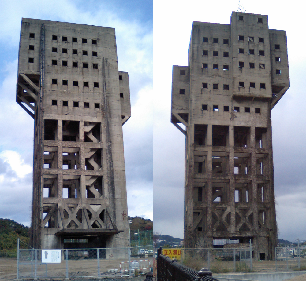 志免炭鉱竪坑櫓（南西側と北東側）